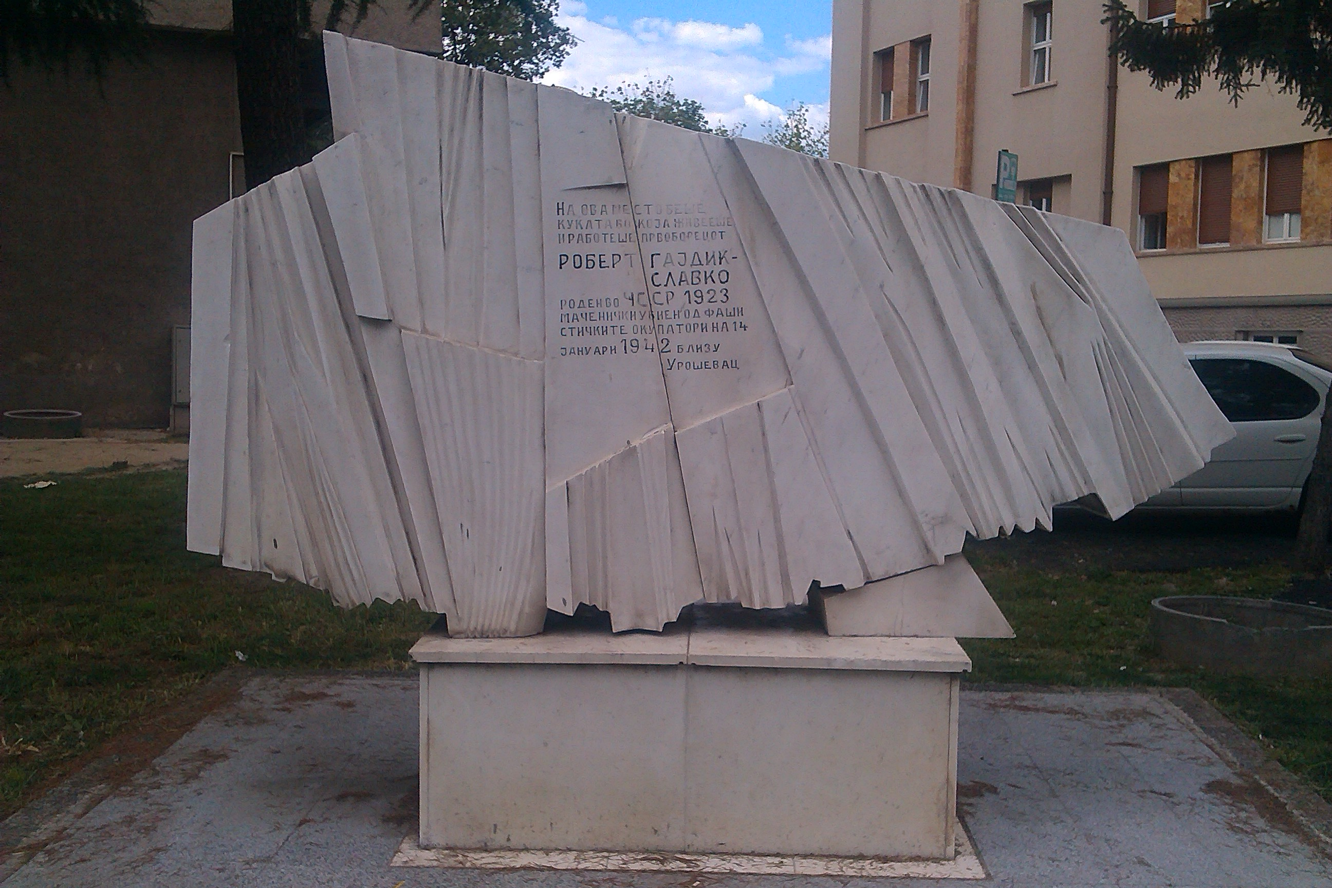 Спомен обележје на Роберт Гајдик во Скопје